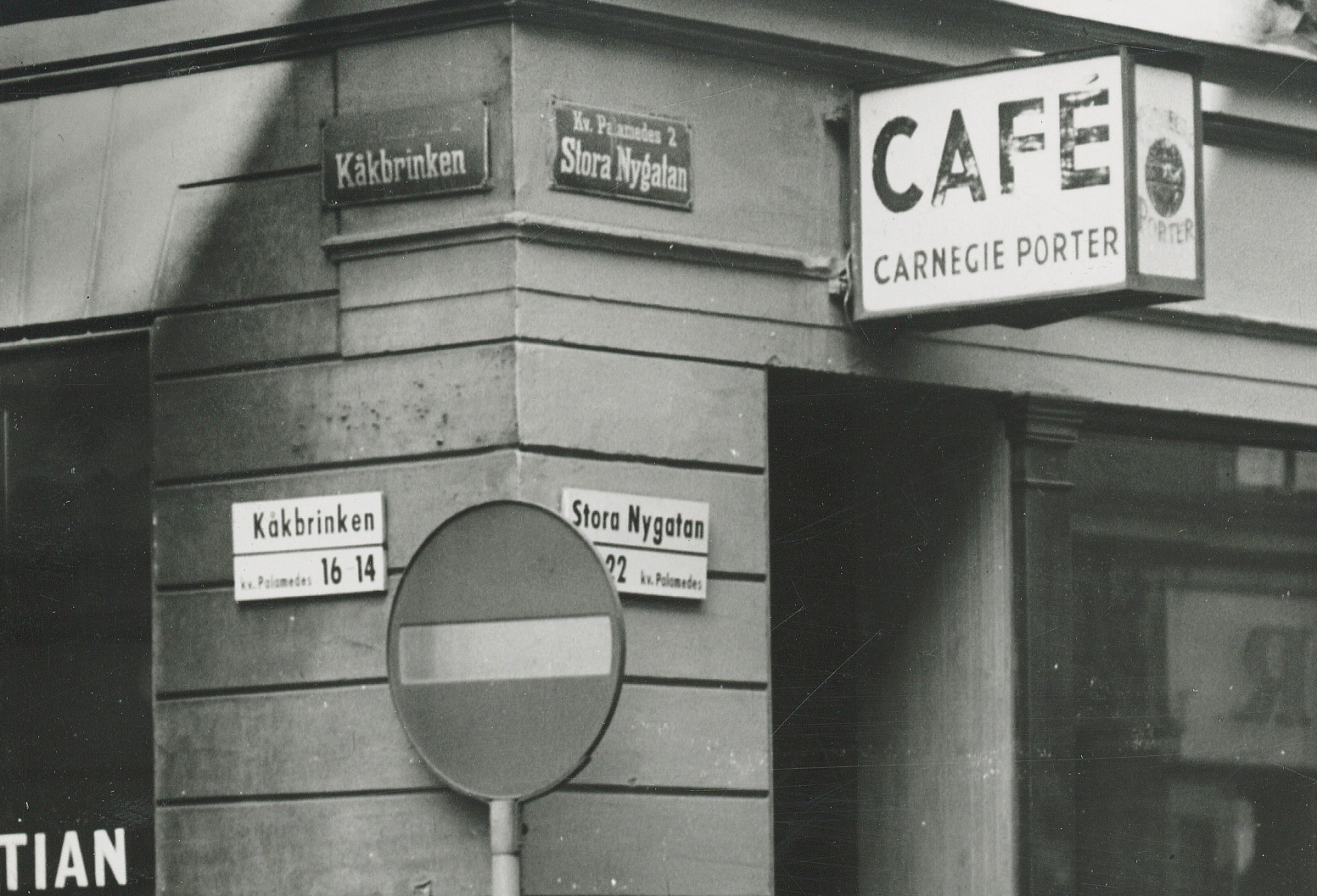 Gatuskyltar, gamla och nya i Stockholm